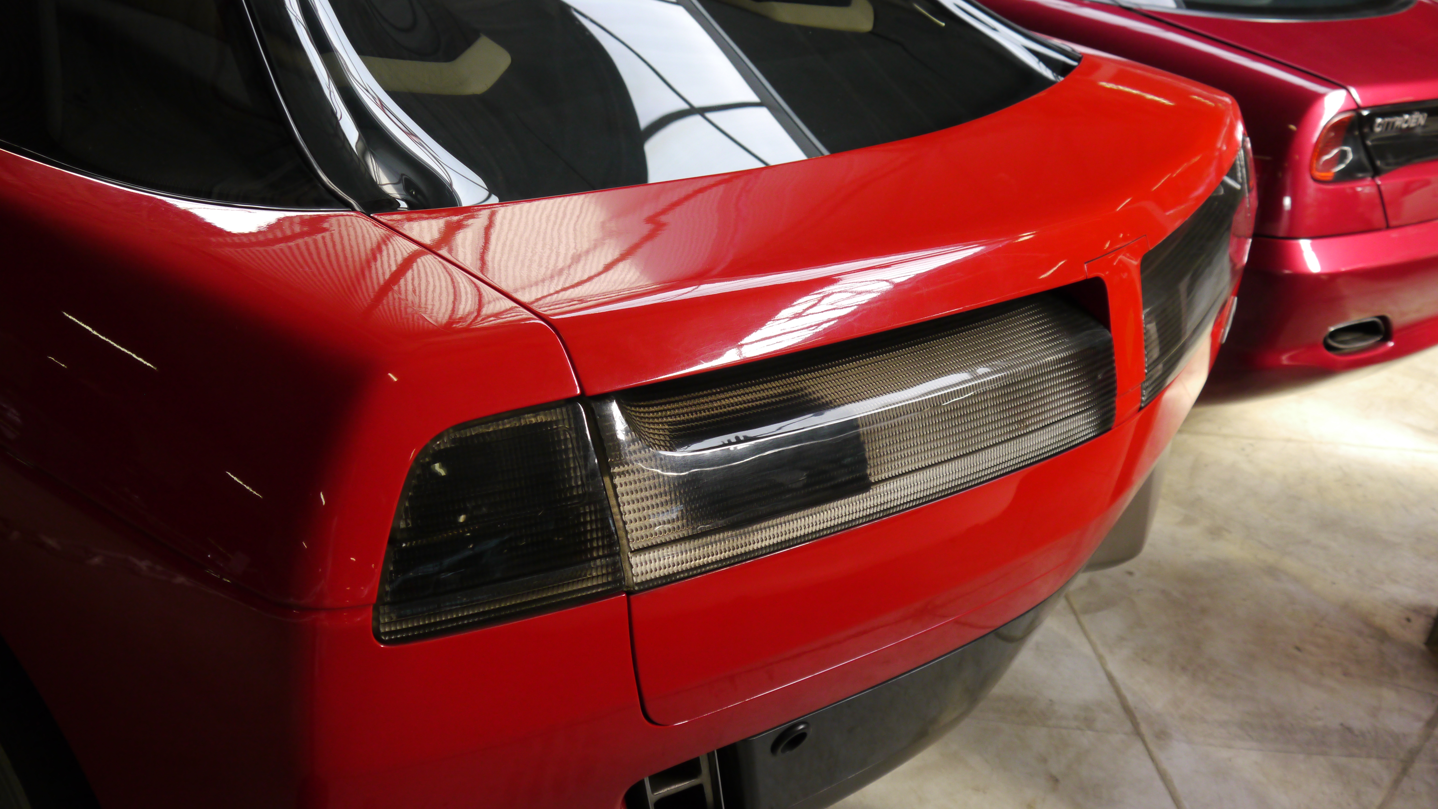 Conservatoire Citroen 260